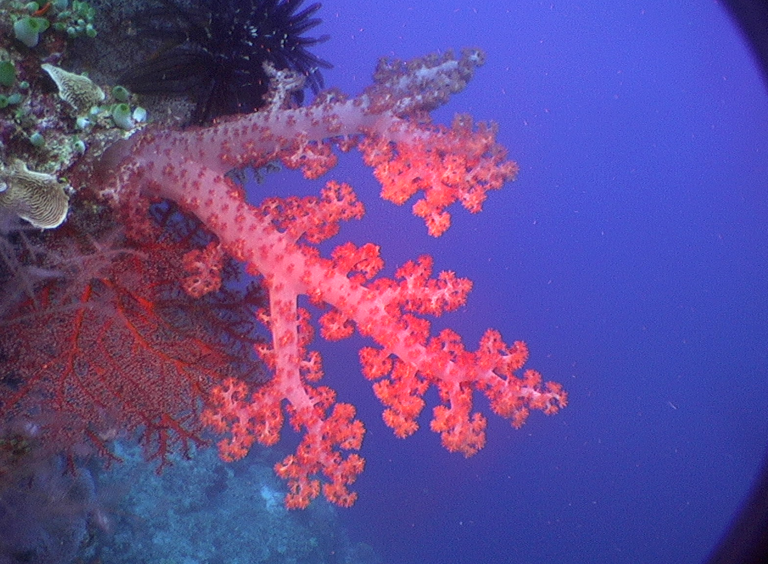 Каралавы карал.